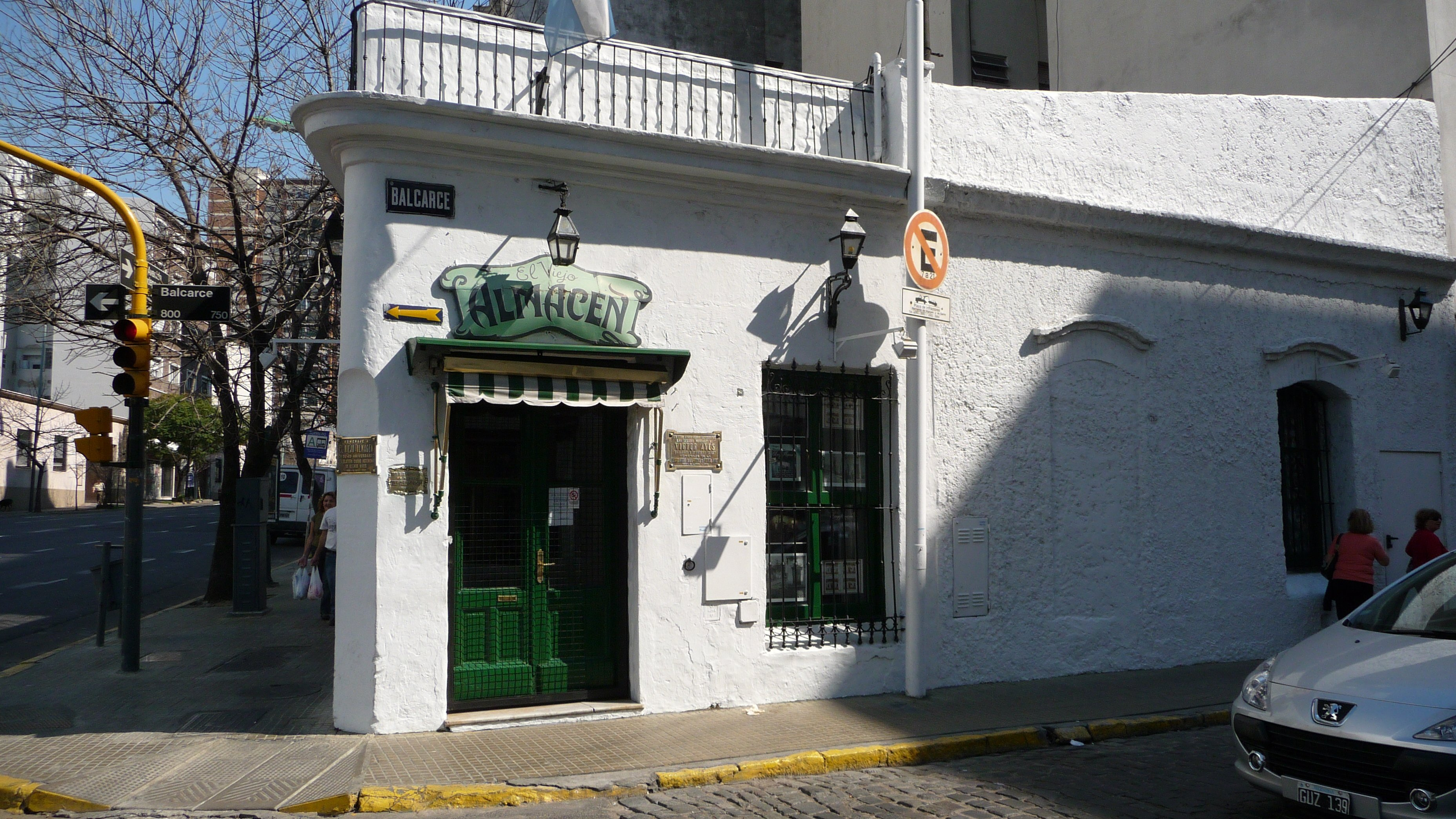 Traditional tango venue El Viejo Almacén, Balcarce and Independencia Streets, Buenos Aires.